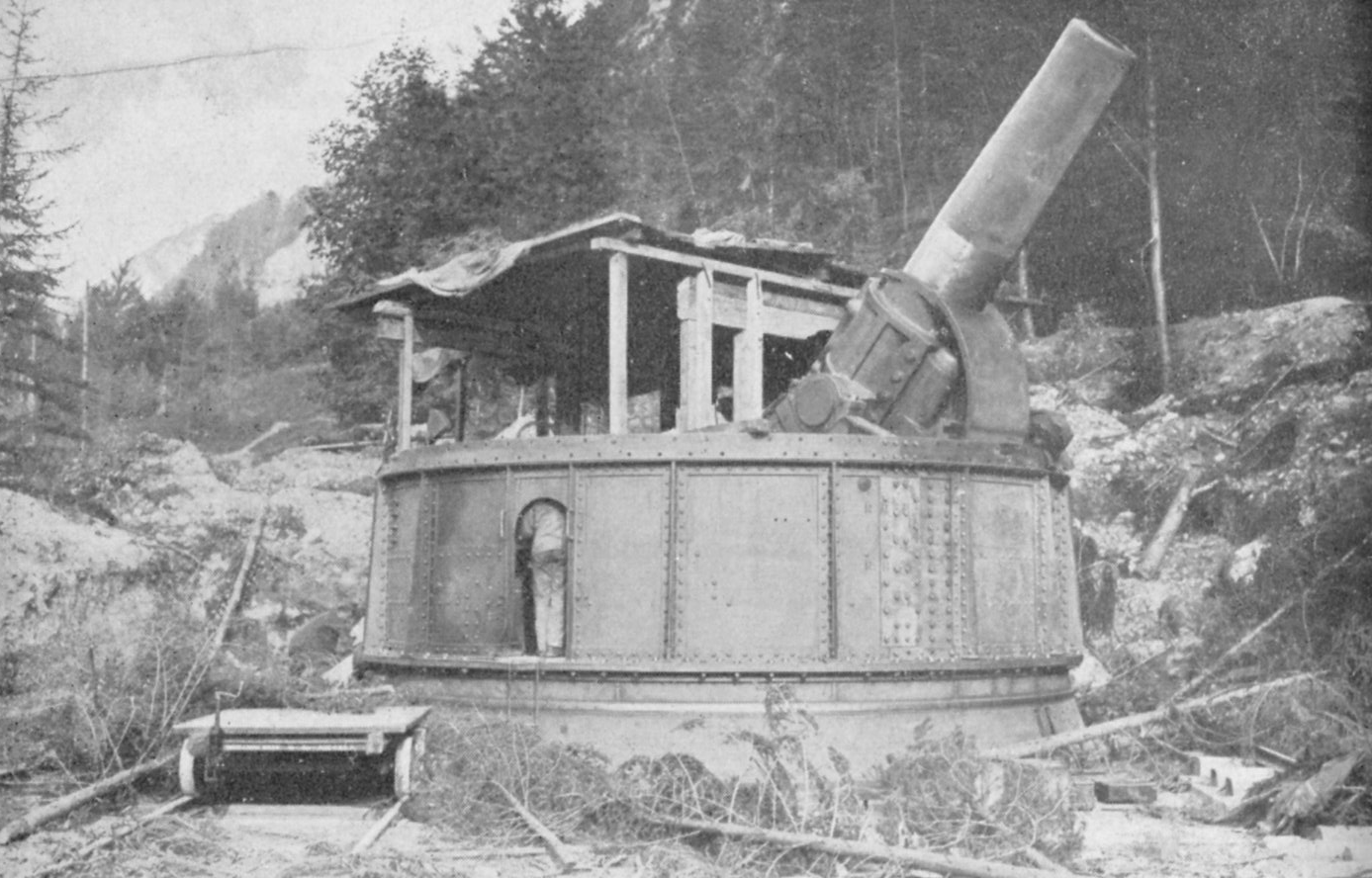 Österreich-ungarische Belagerungshaubitze 42 cm